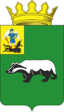 Герб Шенкурского муниципального района (Архангельская область)